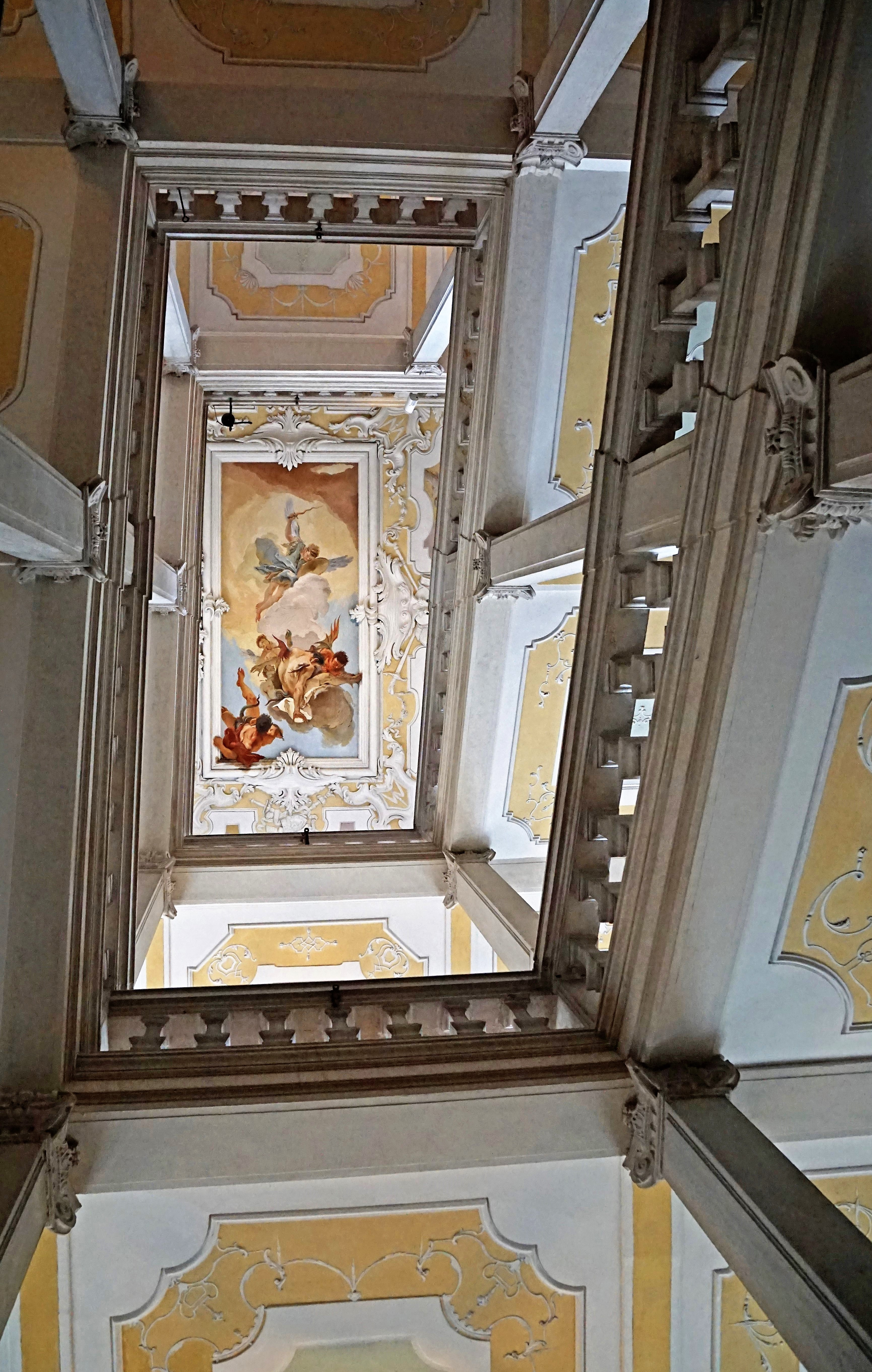 Palazzo Patriarcale (Udine), die Ehrentreppe, Deckenbild: der Höllensturz, von Giambattista Tiepolo